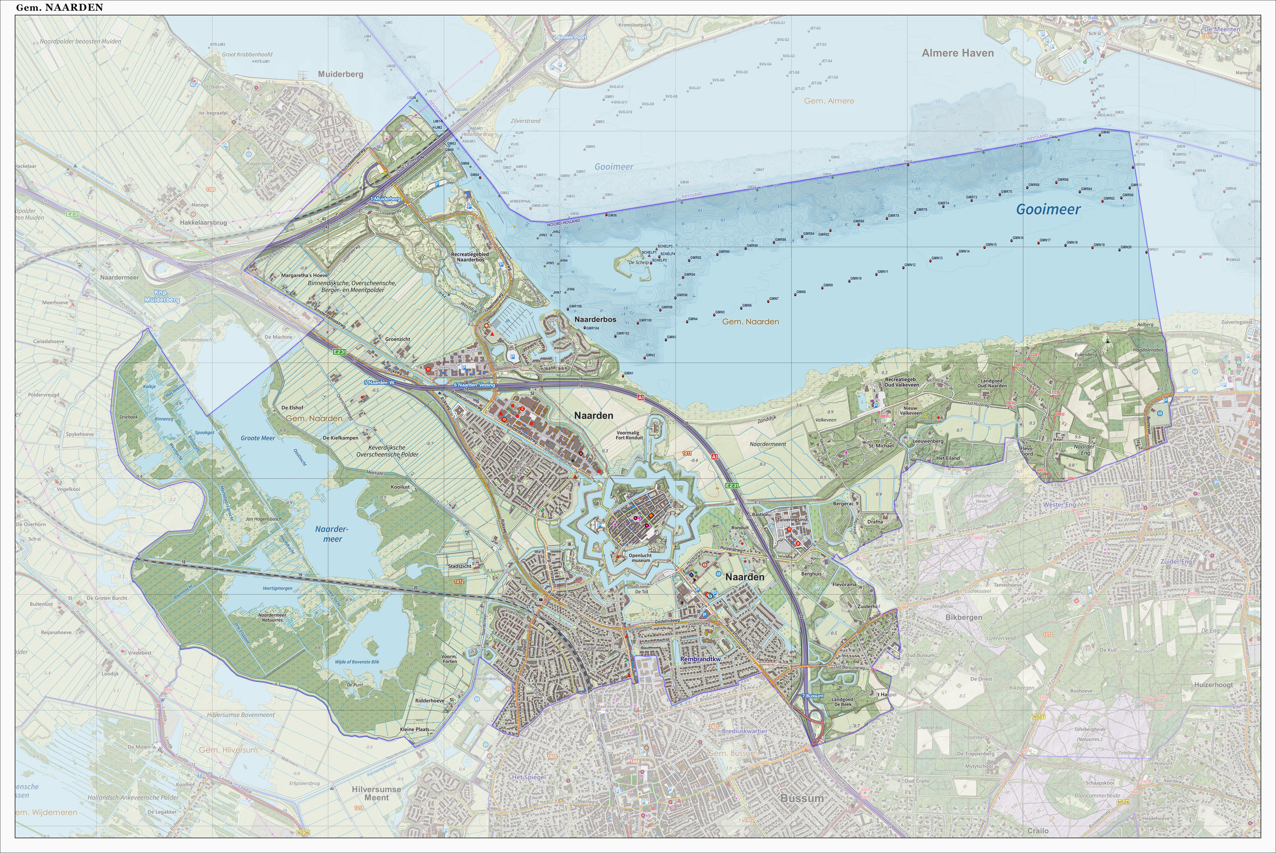 Topografische gemeentekaart. Resolutie: 400 pixels/km. Kaartbeeld samengesteld uit de open geodata van de Top10NL en Top25namen (Kadaster), Creative Commons-BY licentie. Gebouwvlakken uit open geodata BAG extract. Wegen uit de OpenStreetMap, OpenStreetMap community. Reliëfschaduw uit de Actuele Hoogtekaart AHN2. Samenstelling en kleurenschema: Jan-Willem van Aalst, met QGIS. Zie ook de Legenda.